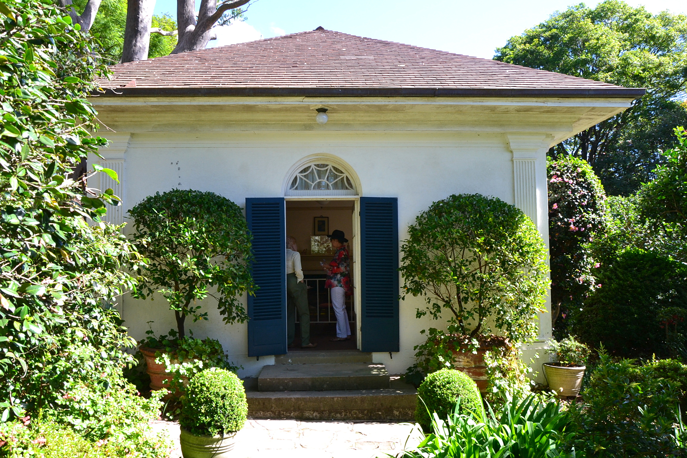 Eryldene, Killara, Sydney